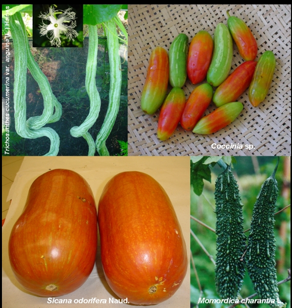 Acesse Coleção de CUCÚRBITA Abóboras, cucurbitáceas não-tradicionais Curadora: Silvia Rocha Moreira Endereço: Unidade de Pesquisa e Desenvolvimento de Ubatuba Rodovia Oswaldo Cruz, 5061, Horto Florestal11.680-000 -Ubatuba (SP)